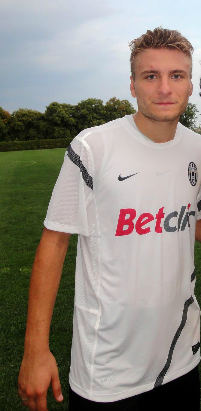 Il calciatore italiano Ciro Immobile in allenamento alla Juventus.